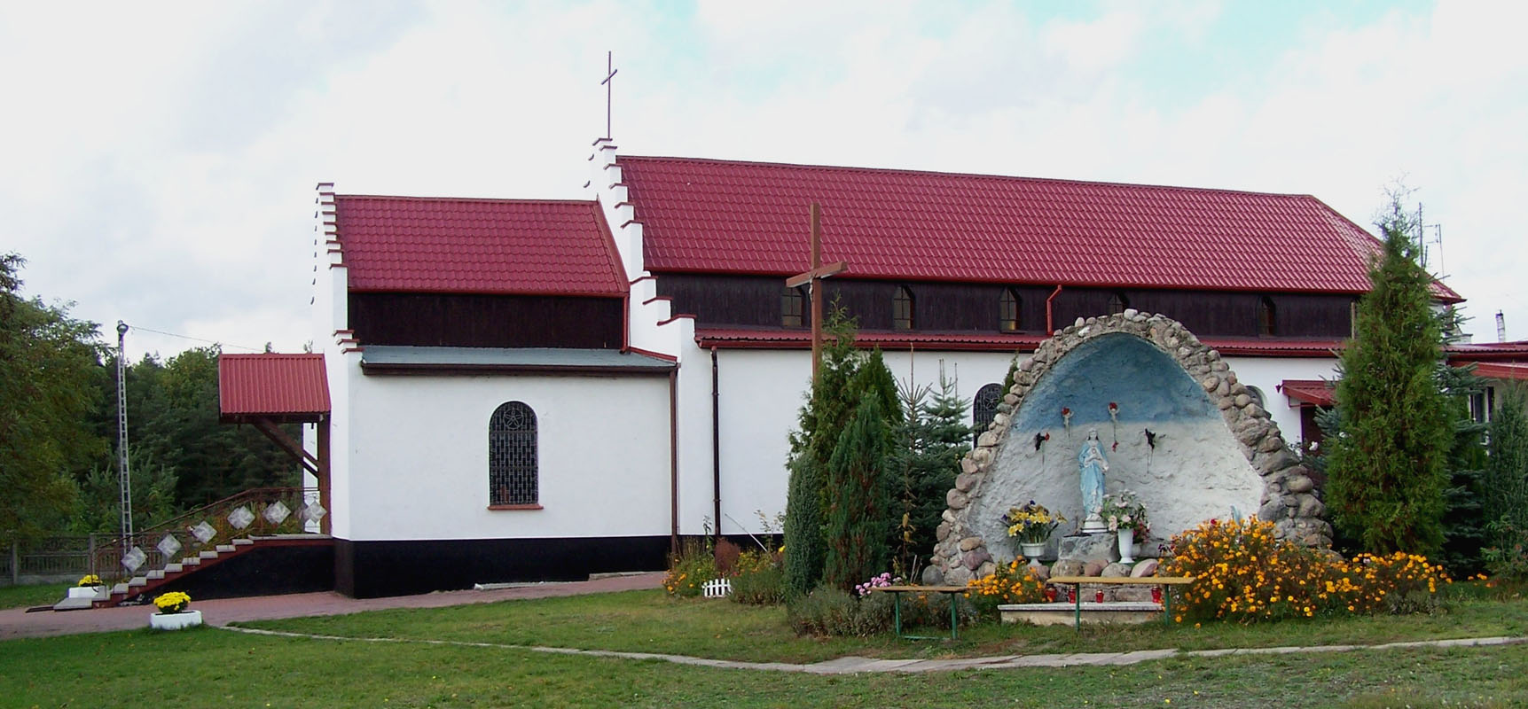 Goleniów Helenów - rzymskokatolicki kościół parafialny p.w. NMP Nieustającej Pomocy